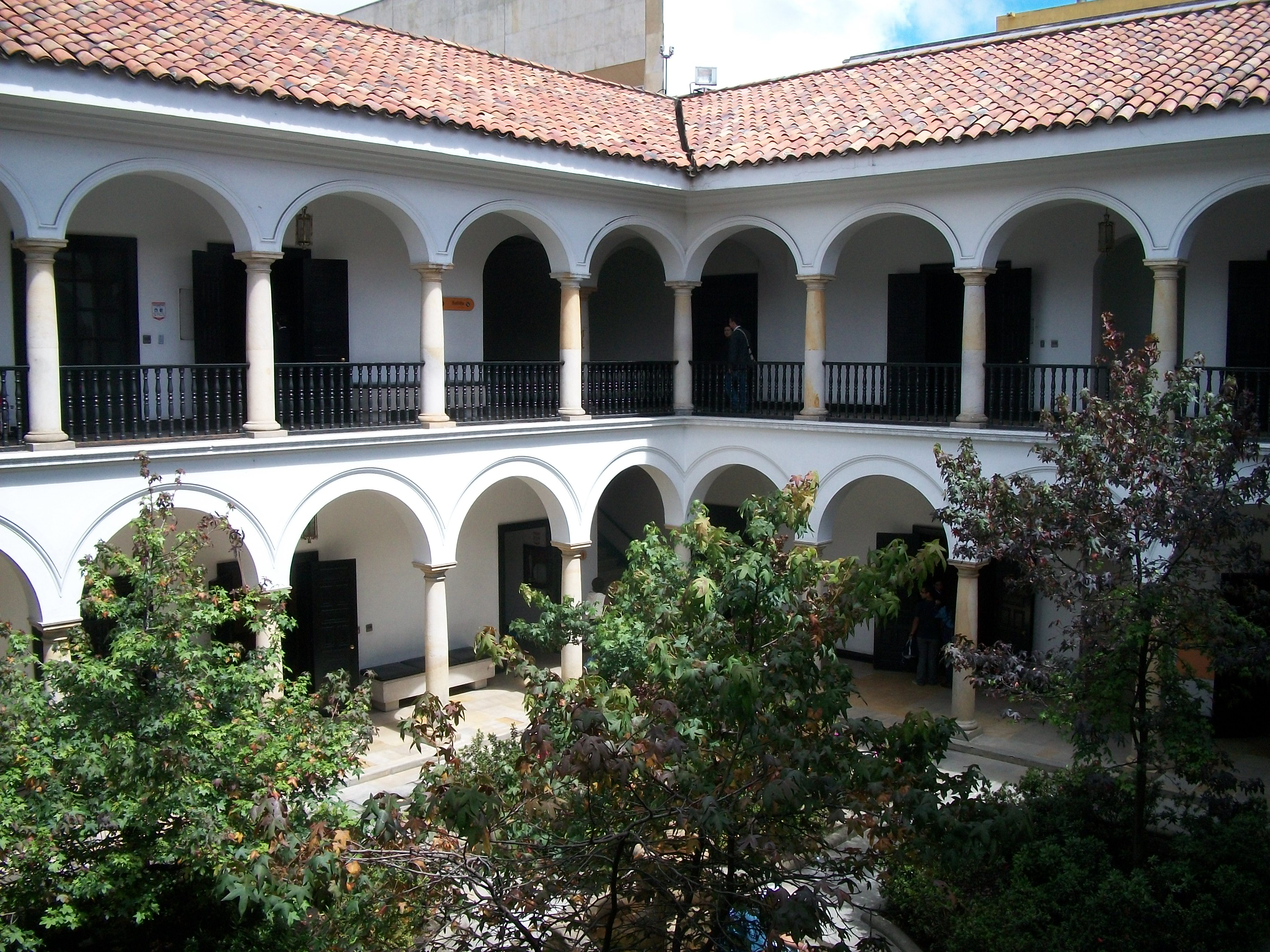 Escultura del Mueso Botero en Bogota.JPG